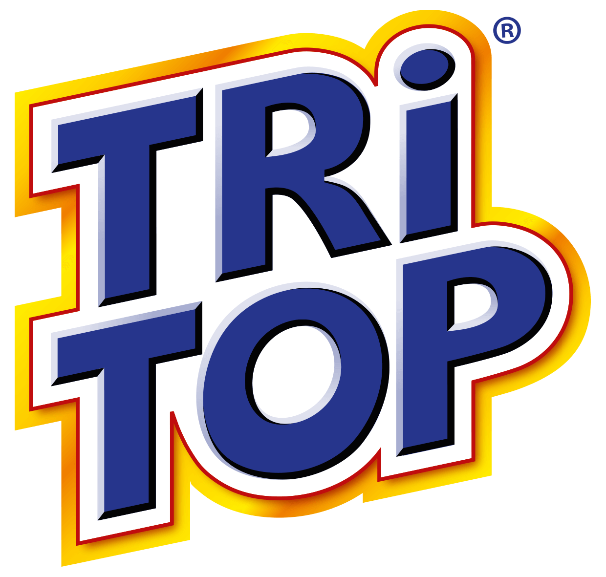 Offizielles TRi TOP Logo in 3-D Optik seit 2020